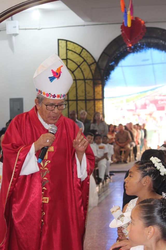 Mons. Arturo Lona Reyes en la Parroquia del Espinal Orizaba 2019